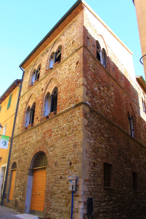 Casa delle Bifore di Piombino, sede dell'archivio storico della città.